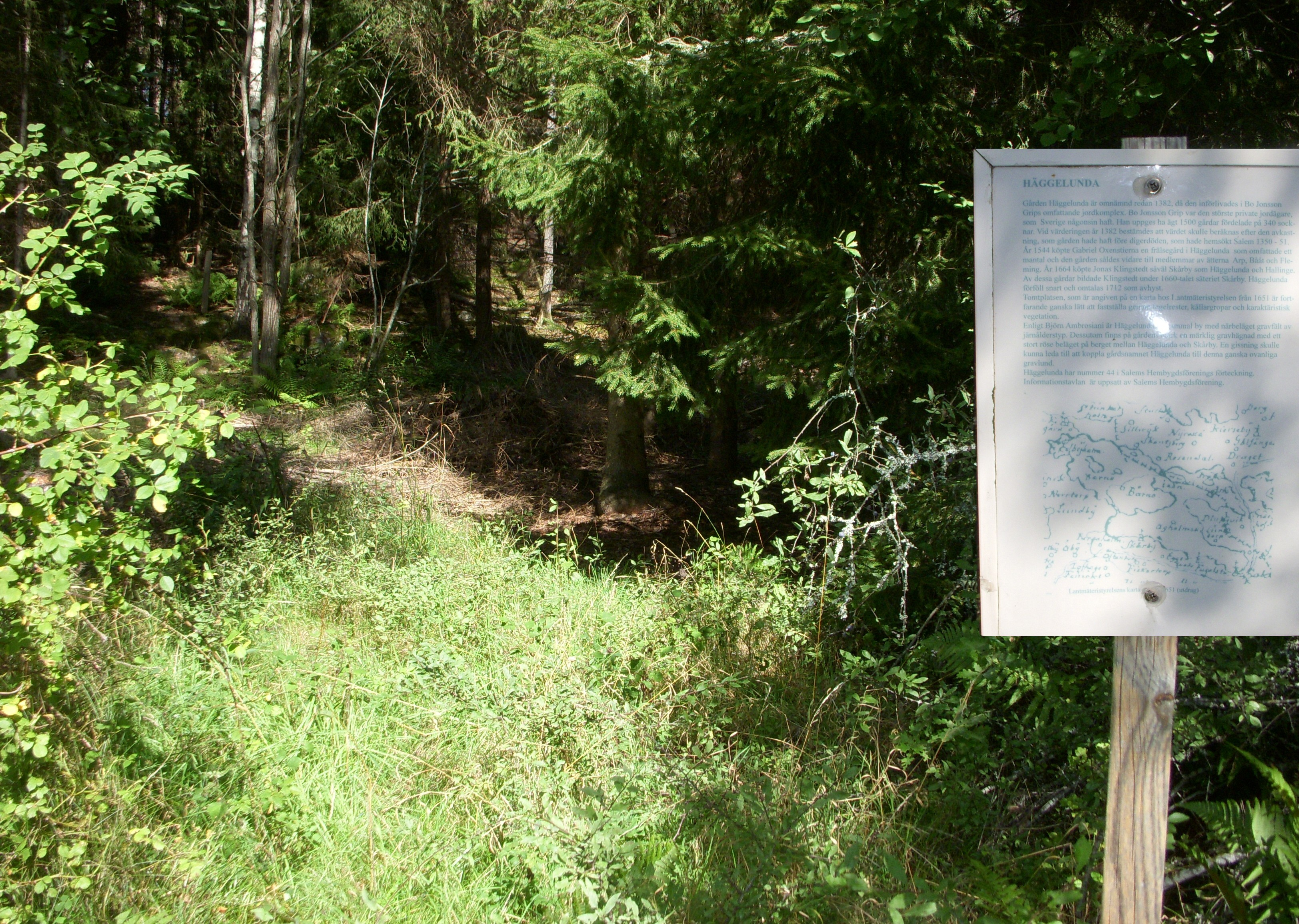 Platsen för Häggelunda gård vid Bornsjön med infoskylt från Salems Hembygdsförening